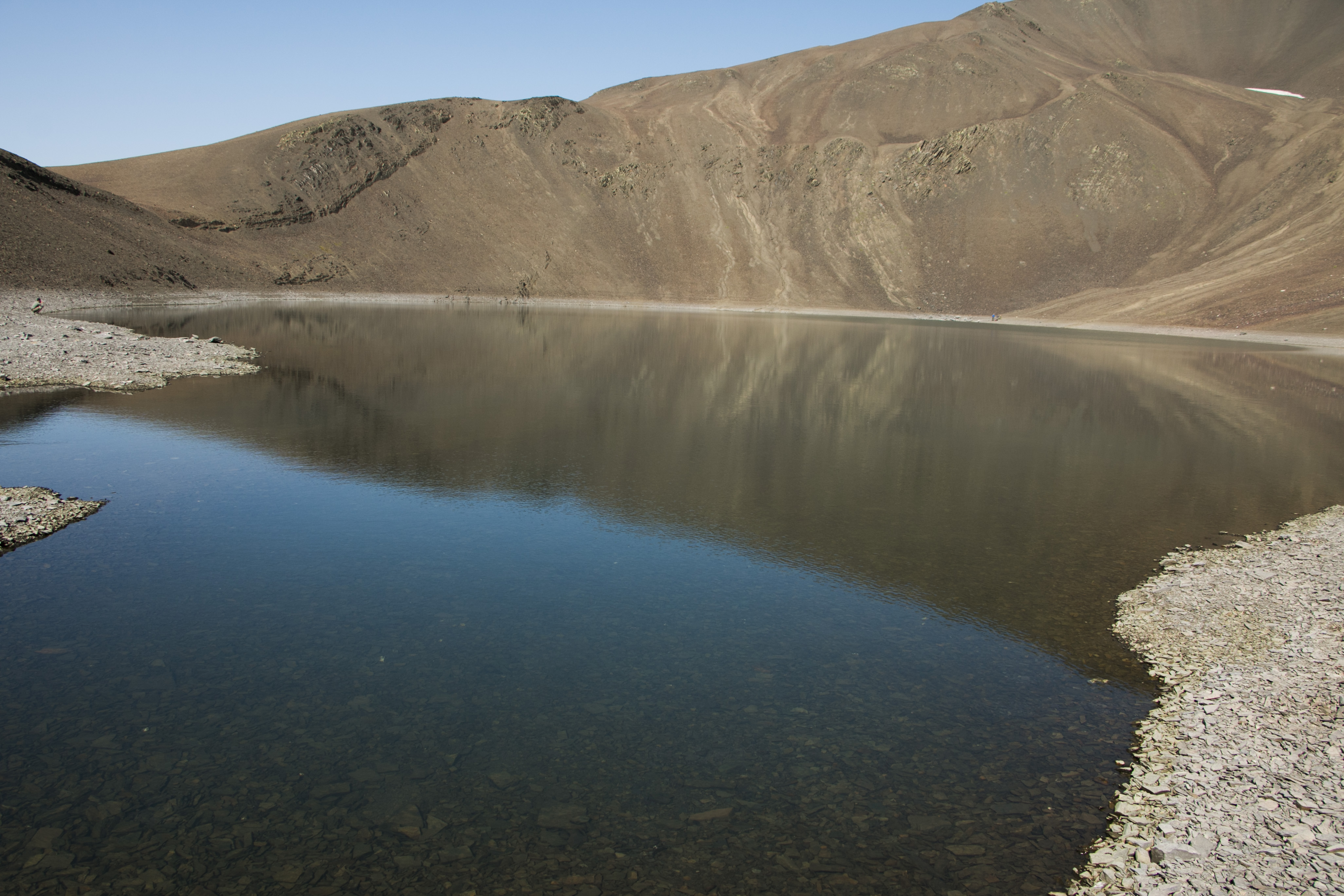 Tufangöl 2